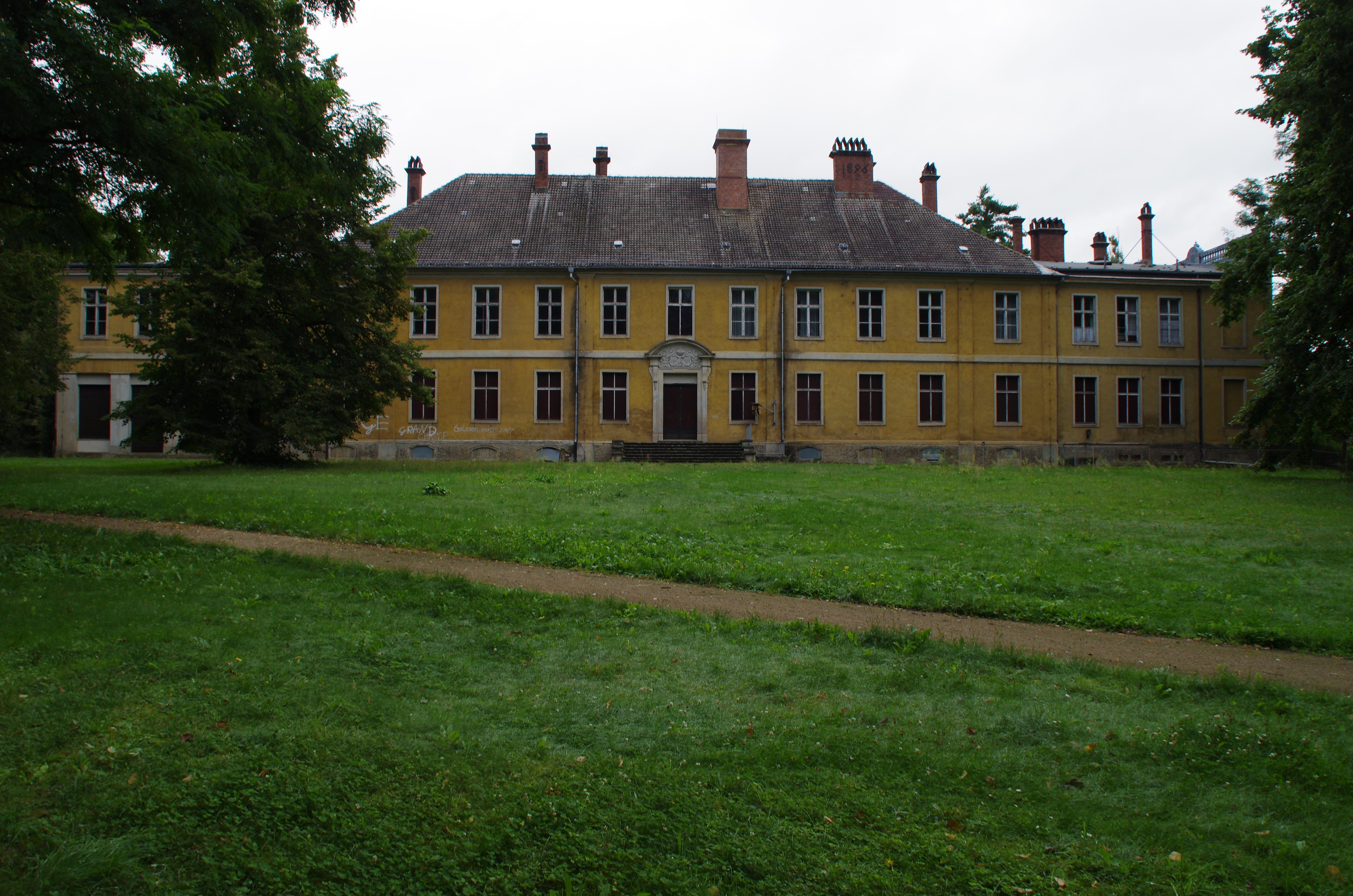 Golßen in Brandenburg. Das Schloss steht unter Denkmalschutz.